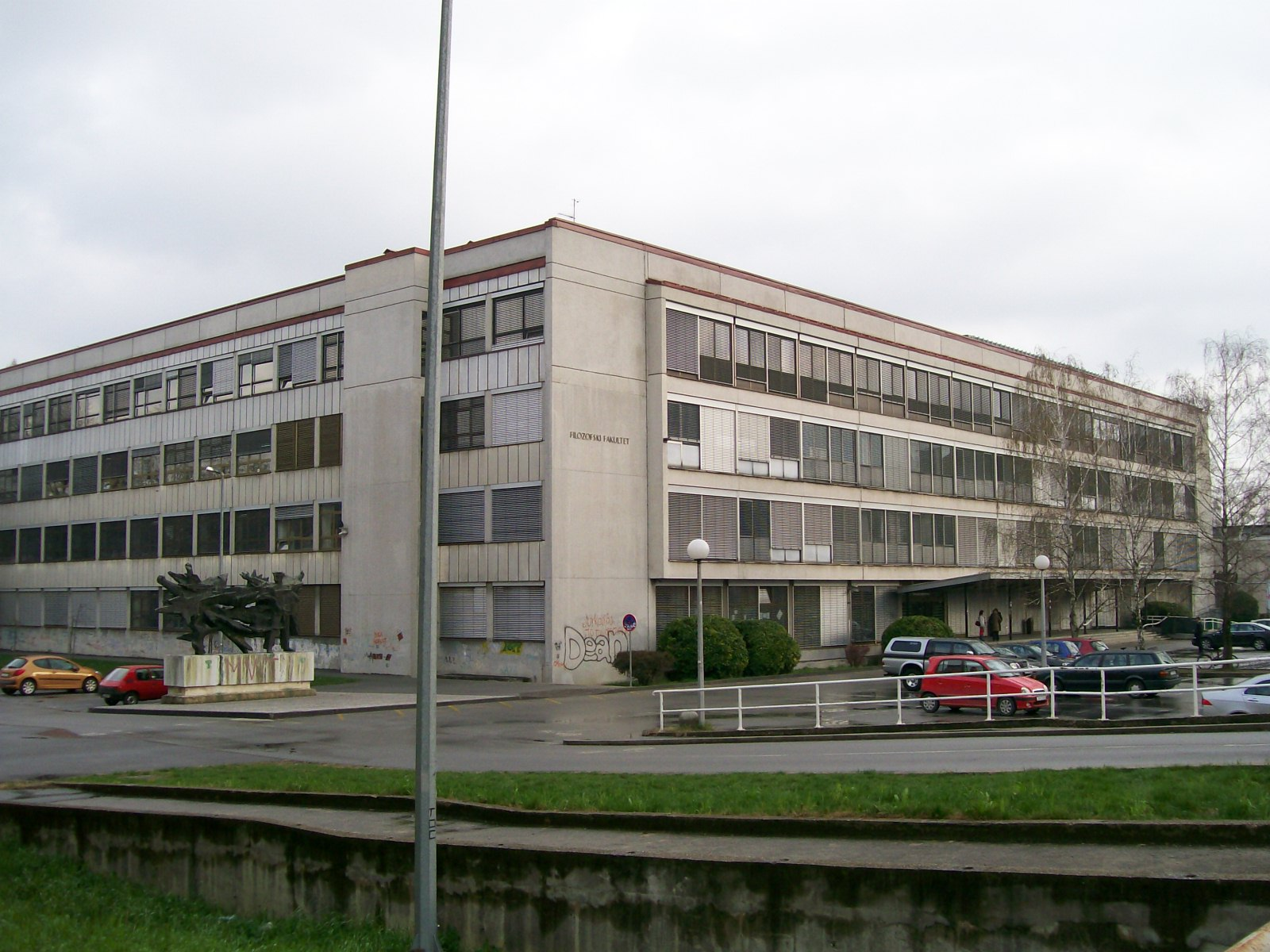 Filozofski fakultet u Zagrebu